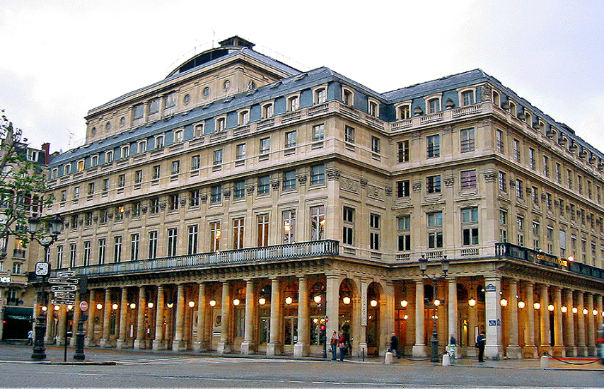 La facade de la Comedie-Francaise, vue á la Avenue de l'Opéra, 2007.